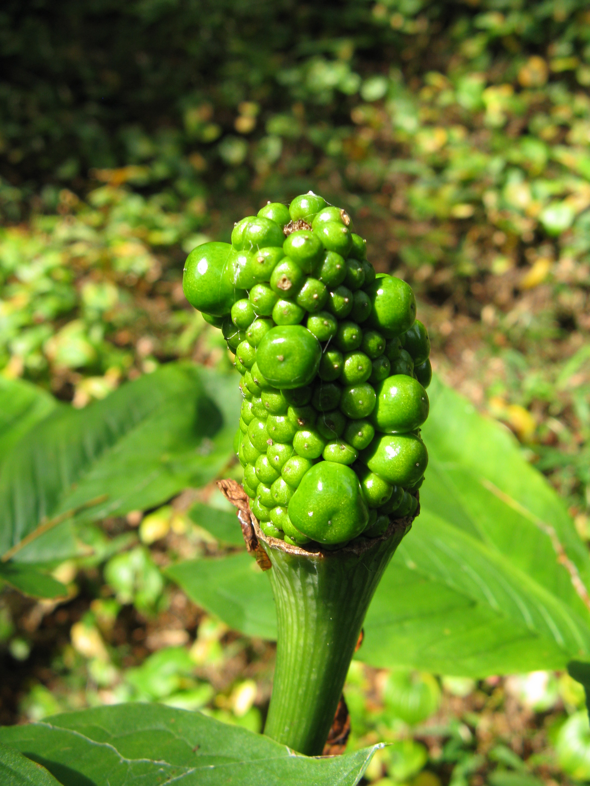 Scientific name Arisaema serratum